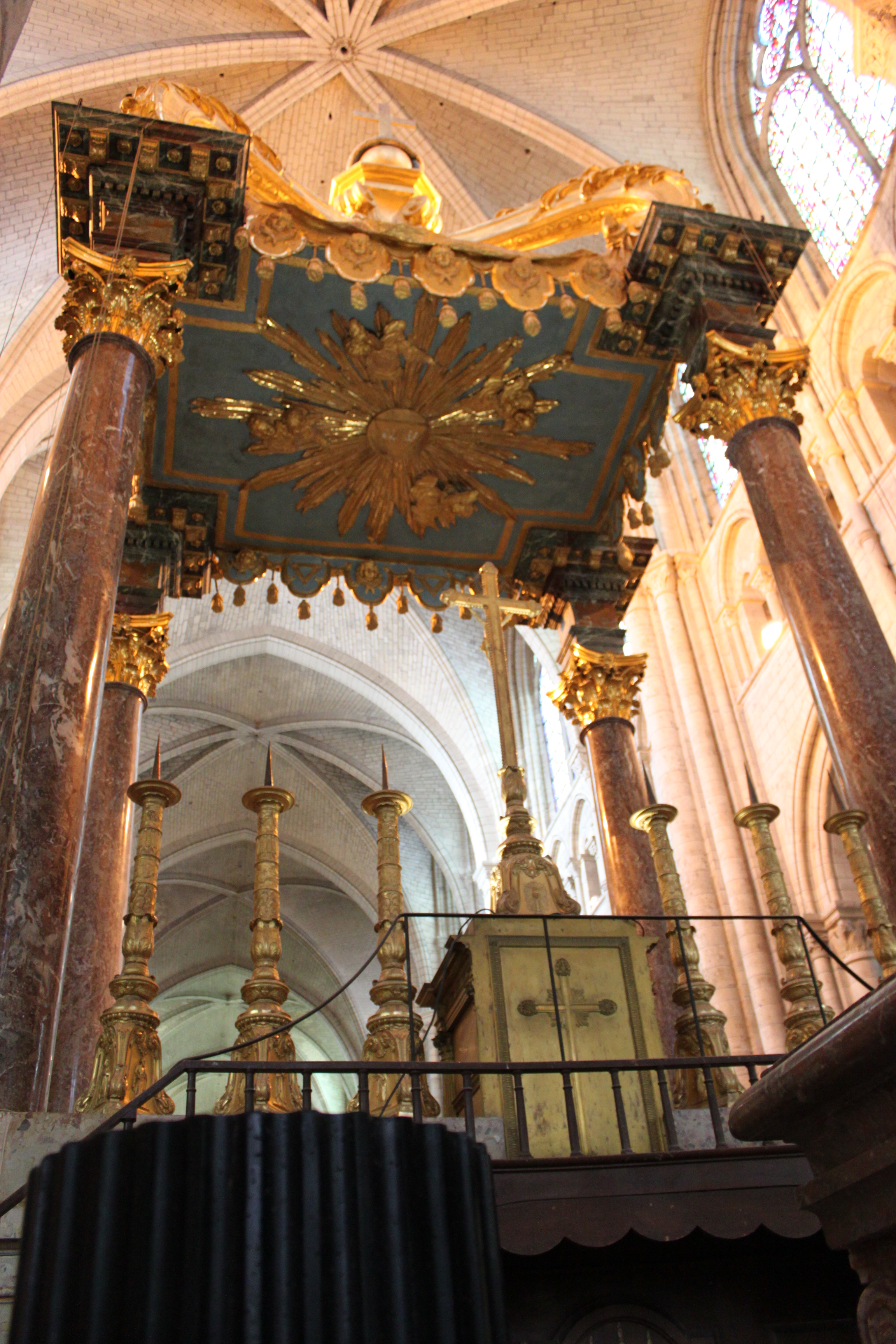 Cathédrale Saint-Étienne, Sens, Yonne, Bourgogne, France